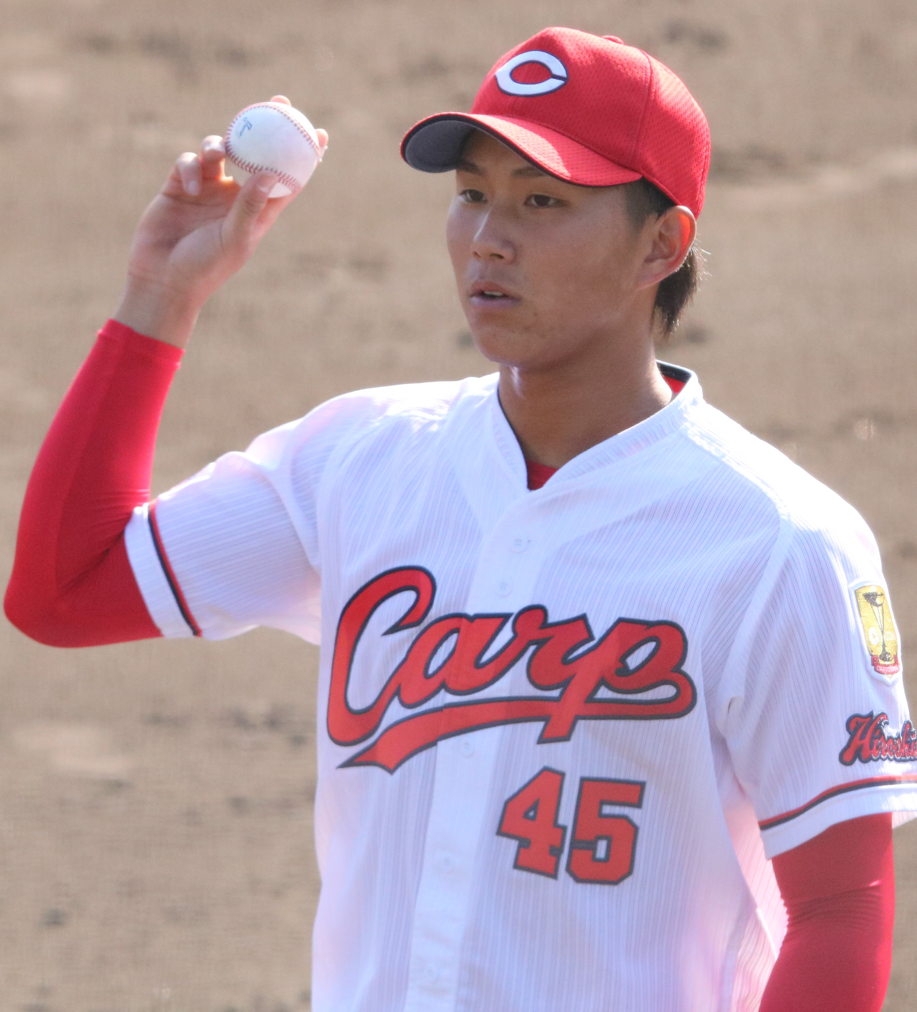 2017/11/9 天福球場